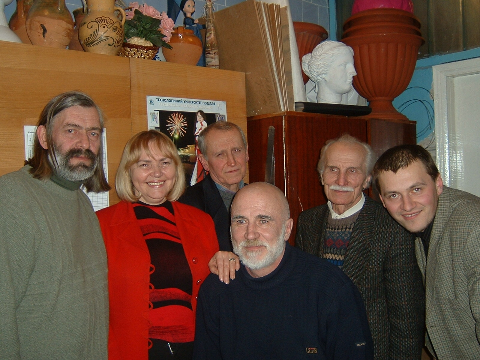 2004 р. На фото викладачі секції дизайну ТКШВ М.Мазур, І.Баннова, В.Войнов, О.Гуменчук, М.Андрійчук, О.Поворозник.